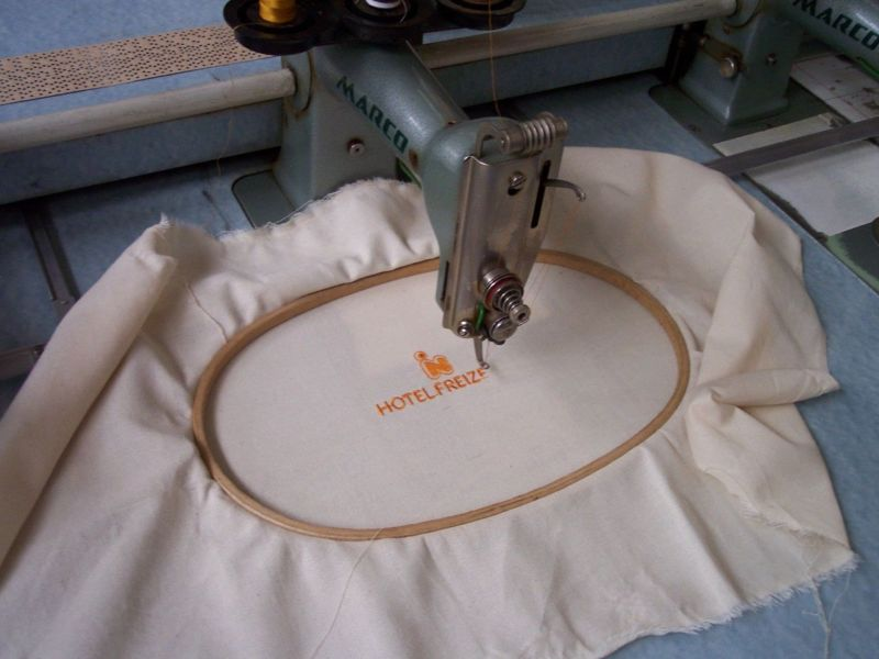 Vysivaci stroj